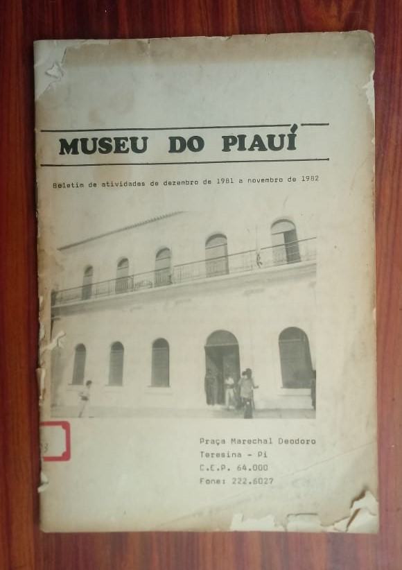 Boletim de atividades do Museu do Piauí de dezembro de 1981 a novembro de 1982